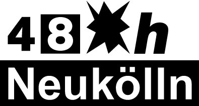 Ein neues Festival Design entwicklet durch Büro Otto Sauhaus